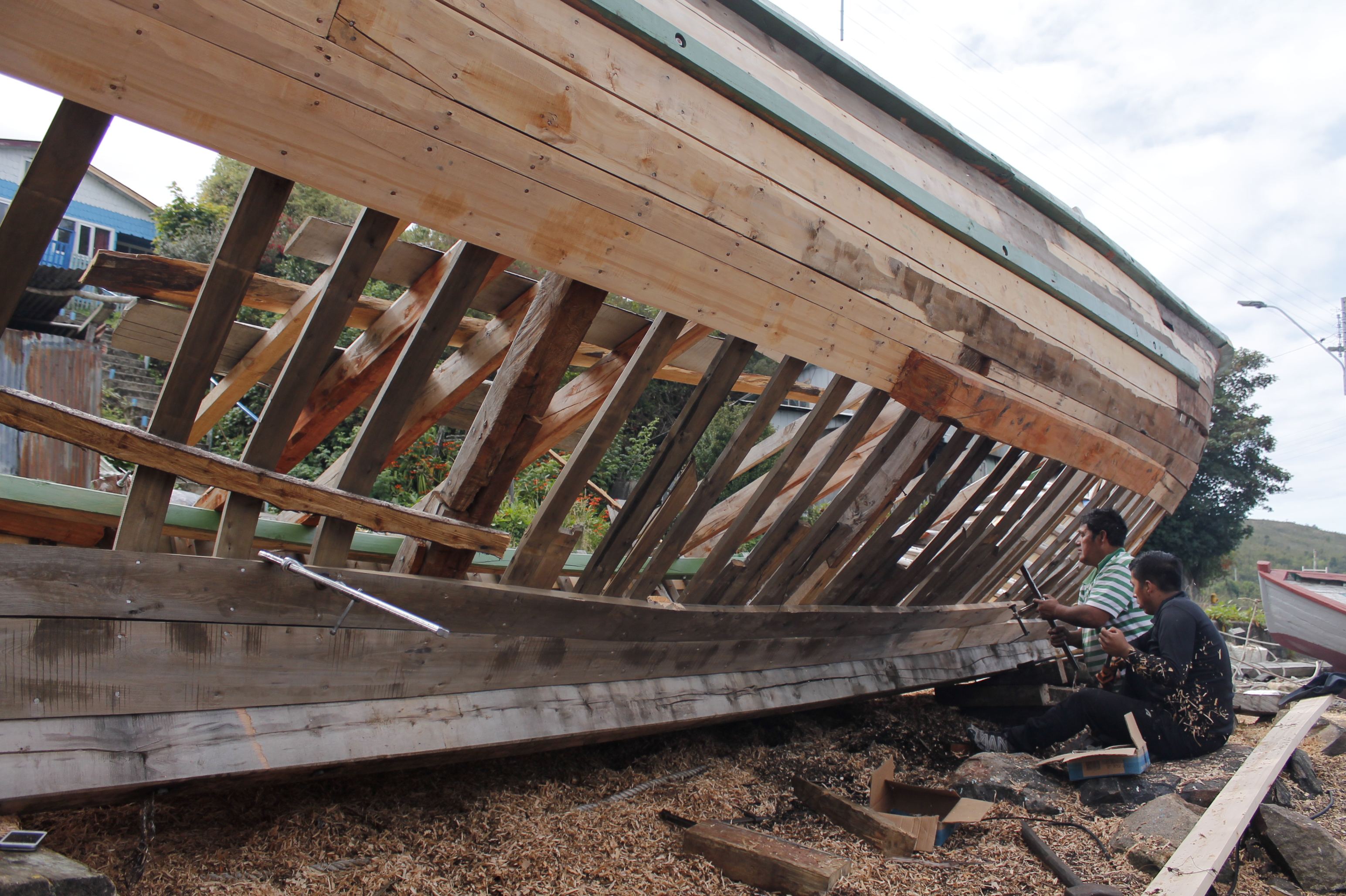 Carpintería de Rivera en Melinka, Guaitecas